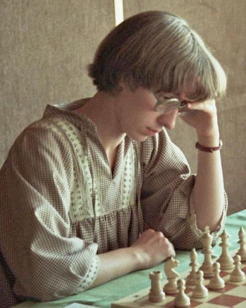 Eliska Klimova in Bad Kissingen 1982